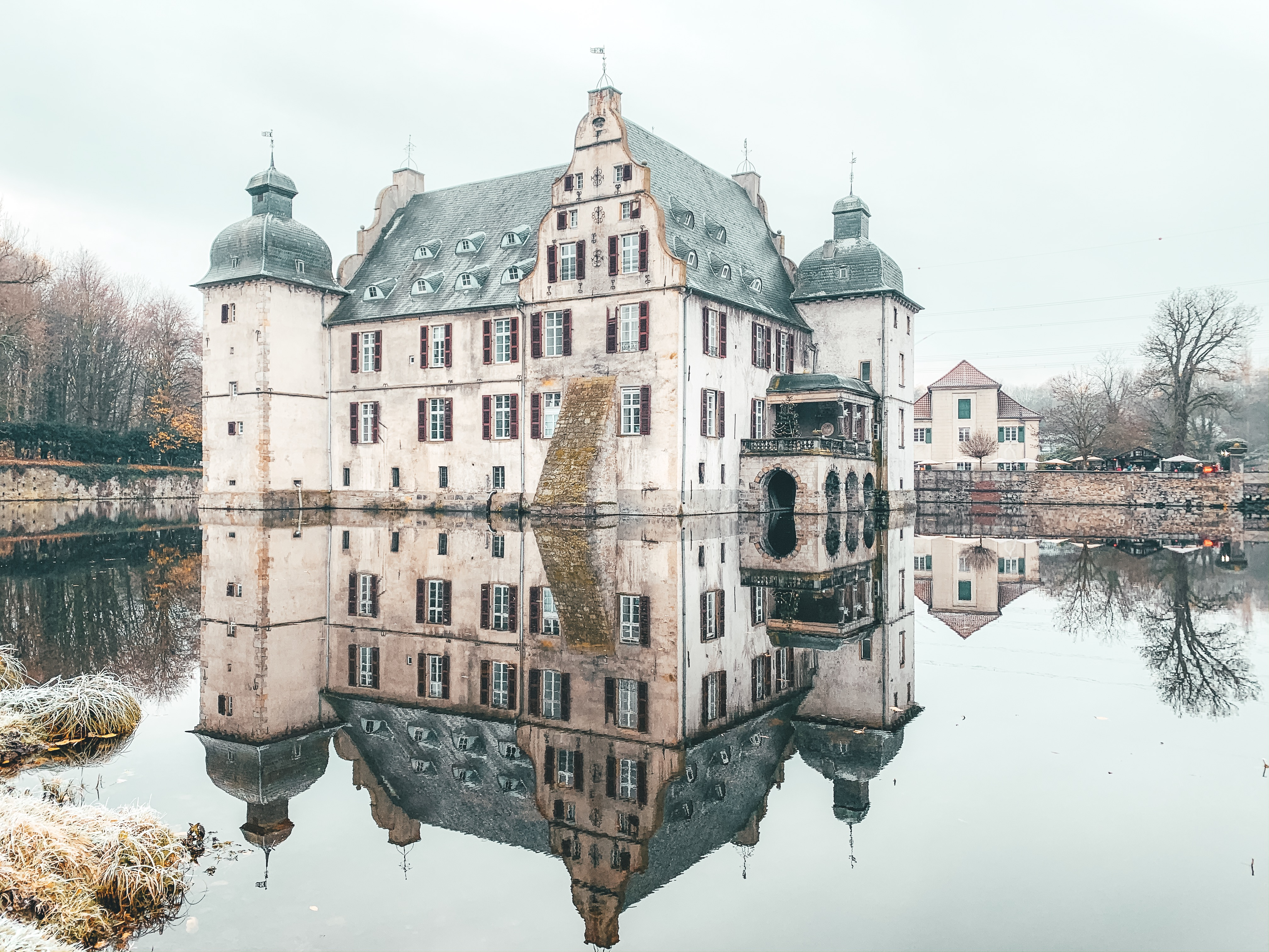 Wasserschloss Bodelschwingh